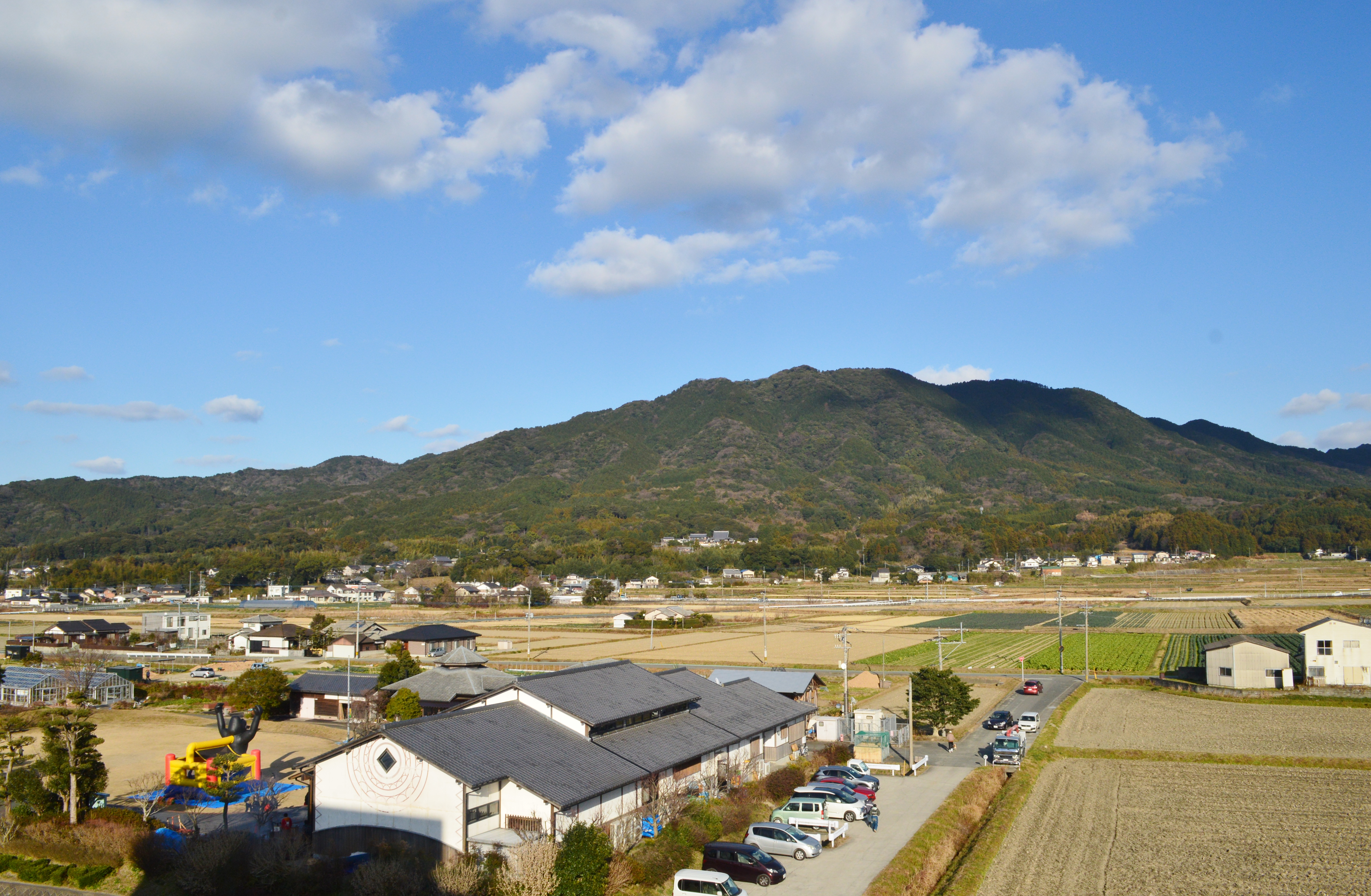 高祖山 (伊都国歴史博物館から望む)